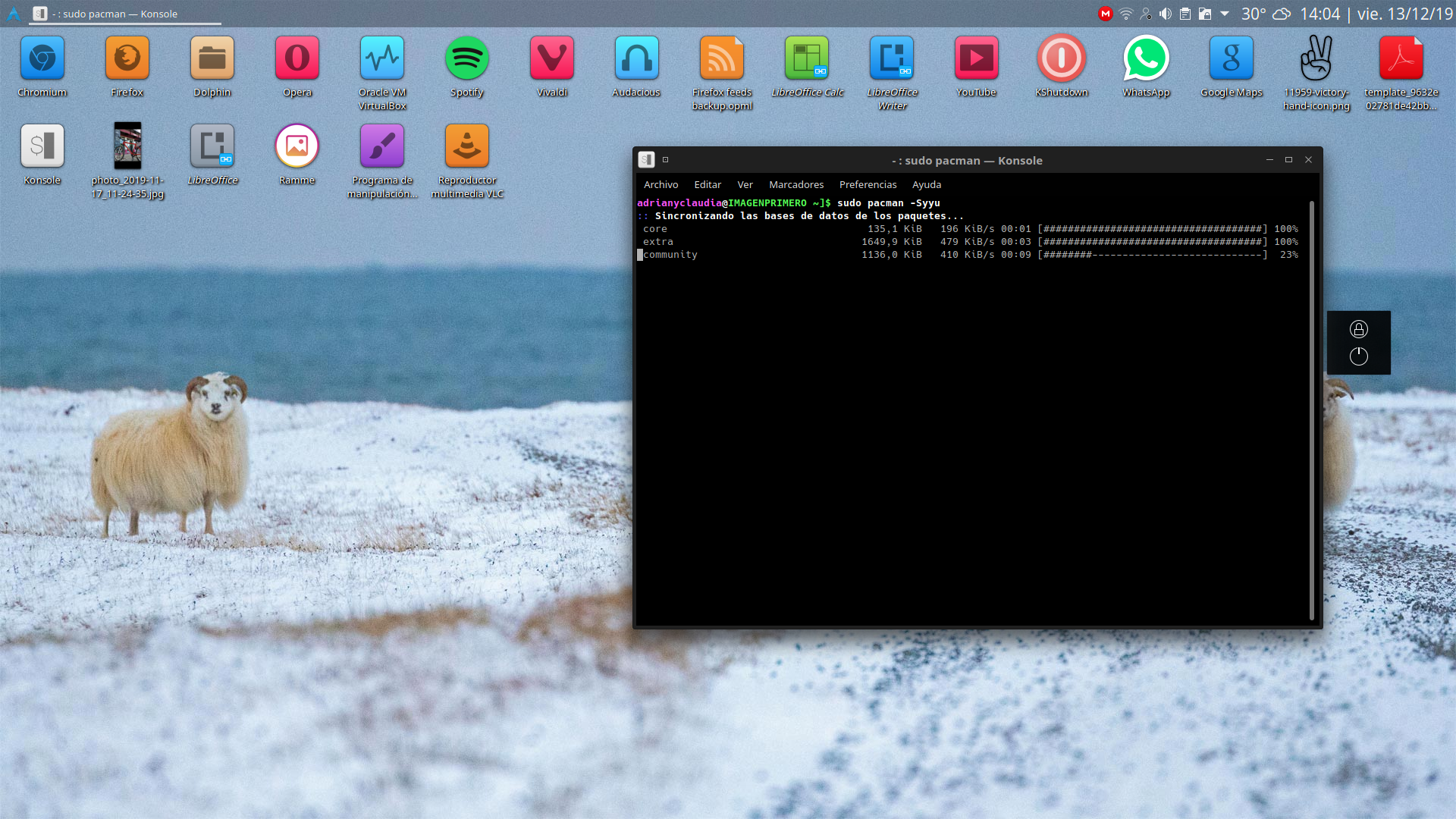 Pacman en ejecución en ventana de la terminal Konsole. Arch Linux con escritorio Plasma 5.